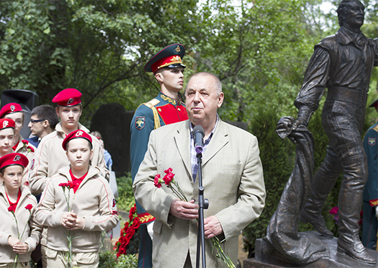 Главный режиссёр Центрального академического театра Российской армии Народный артист России Борис Морозов на церемонии открытия памятника актёру Владимиру Зельдину на Новодевичьем кладбище Москвы